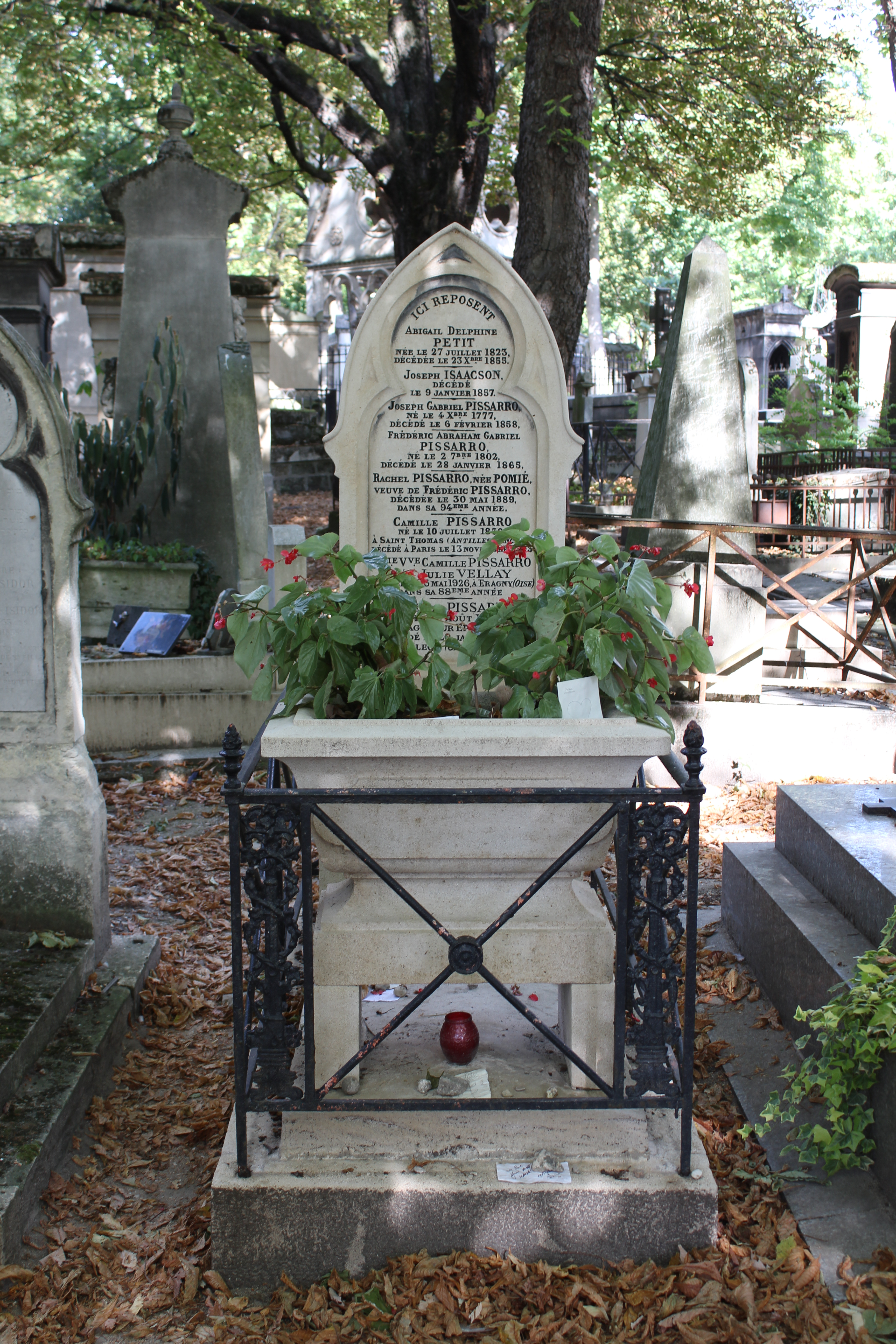 Vue d'ensemble